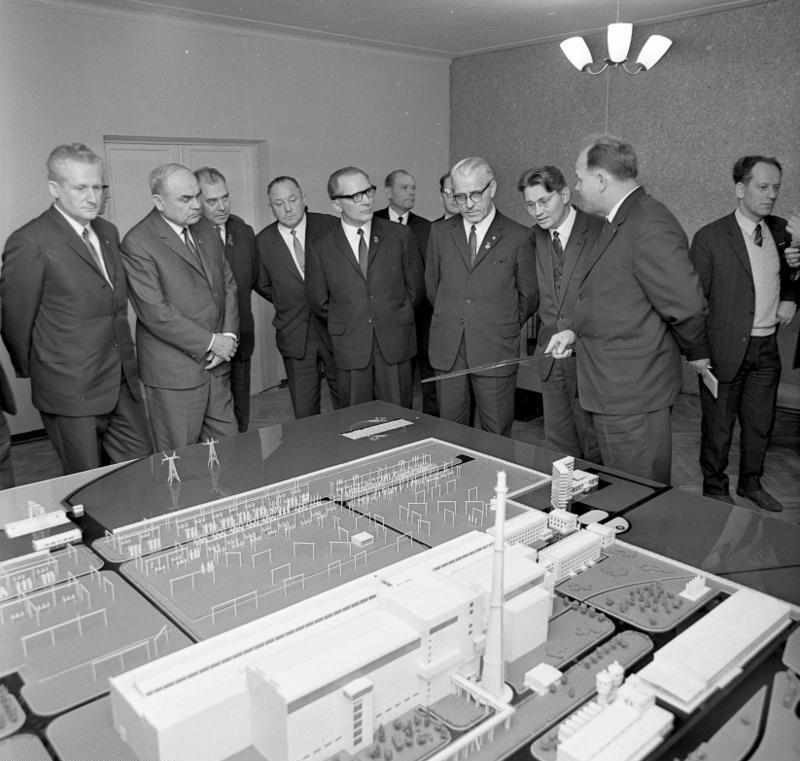 Sowjetunion, DDR-Delegation besucht Atomkraftwerk Nowo Woronesh Zentralbild/Junge 13.11.67 Sowjetunion- 50 Jahre Sowjetmacht Gäste aus der DDR im Atomkraftwerk Nowo Woronesh Die Partei- und Regierungsdeligation der DDR, die zu den Jubiläumsfeierlichkeiten in der Sowjetunion weilte, besichtigte am 9.11.1967 das Atomkraftwerk von Nowo Woronesh. Der Direktor des Atomkraftwerkes, Staatspreisträger Fjodor Owtschennikow (r) , erkläerte den Gästen aus der DDR den Aufbau des Kraftwerkes. Auf unserem Foto neben Owtschennikow Willi Stoph, Mitglied des Politbüros des ZK der SED und Vorsitzender des Ministerrats der DDR; Erich Honecker, Mitglied des Politbüros und Sekretär des ZK der SED; Erich Mielke, Mitglied des ZK der SED und Minister für Staatssicherheit der DDR; der Vorsizende der Staatlichen Planungskommission der UdSSR, Nikolai Baibakow (2.v.l.), und Günter Mittag, Mitglied des Politbüros und Sekretär des ZK der SED (l). Abgebildete Personen: Mielke, Erich: Minister für Staatssicherheit, Armeegeneral, Politbüro des Zentralkomitees (ZK) der SED, DDR (GND 118977490) Honecker, Erich: Staatsratsvorsitzender, Generalsekretär des ZK der SED, DDR (GND 118553399) Stoph, Willi: Ministerpräsident, Staatsratsvorsitzender, Armeegeneral, SED, DDR Baibakow, Nikolai Konstantinowitsch: Stellvertretender Vorsitzender des Ministerrates, Mitglied ZK der KP, Sowjetunion Mittag, Günter Dr.: Stellvertretender Staatsratsvorsitzender, Politbüro des ZK der SED, FDGB, DDR (GND 11897629X) Fjodor Owtschennikow (ru: Фёдор Яковлевич Овчинников (1925-1994) [1], [2])